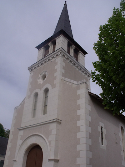 Eglise Saint Germain